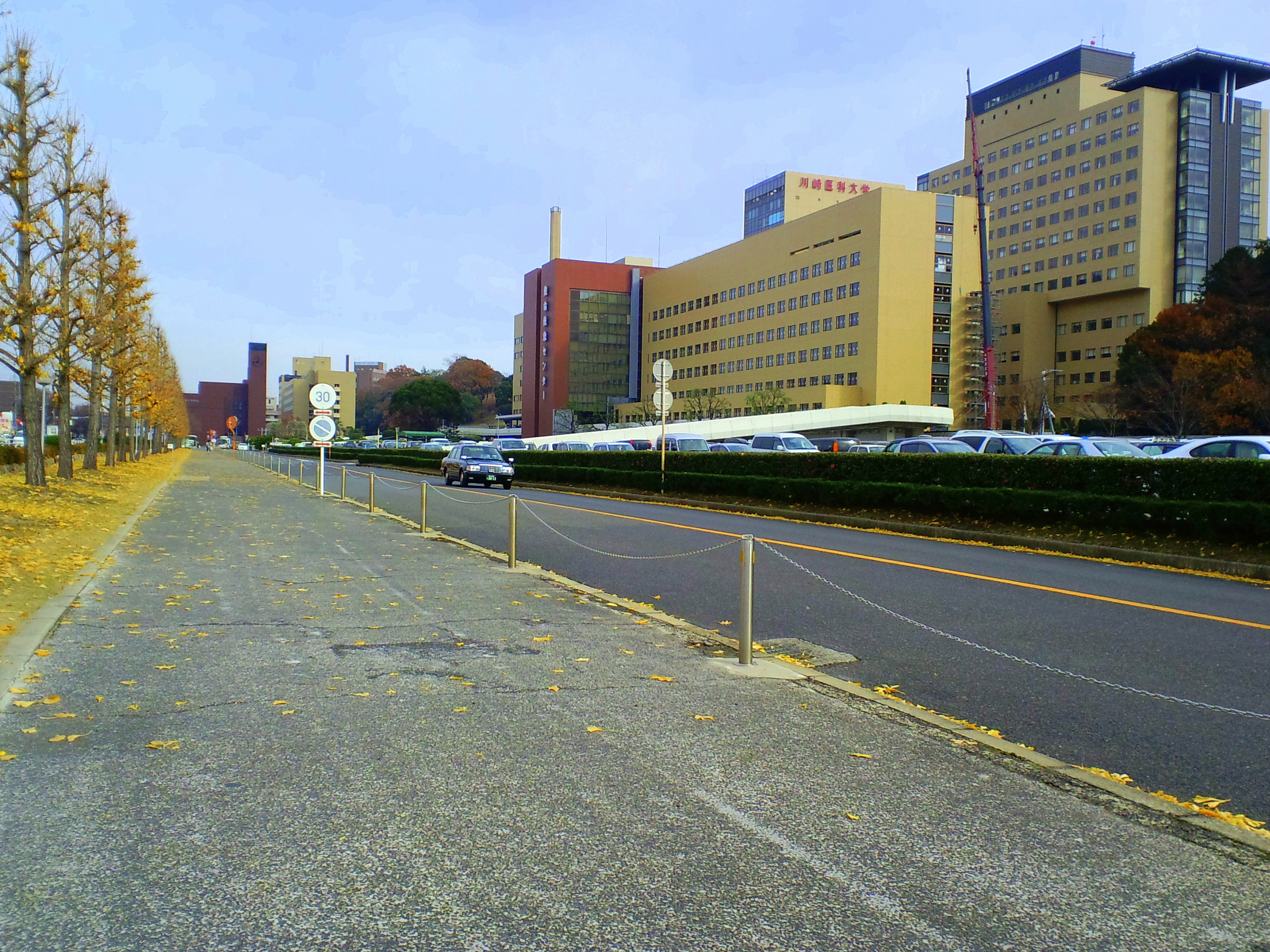 川崎医科大学